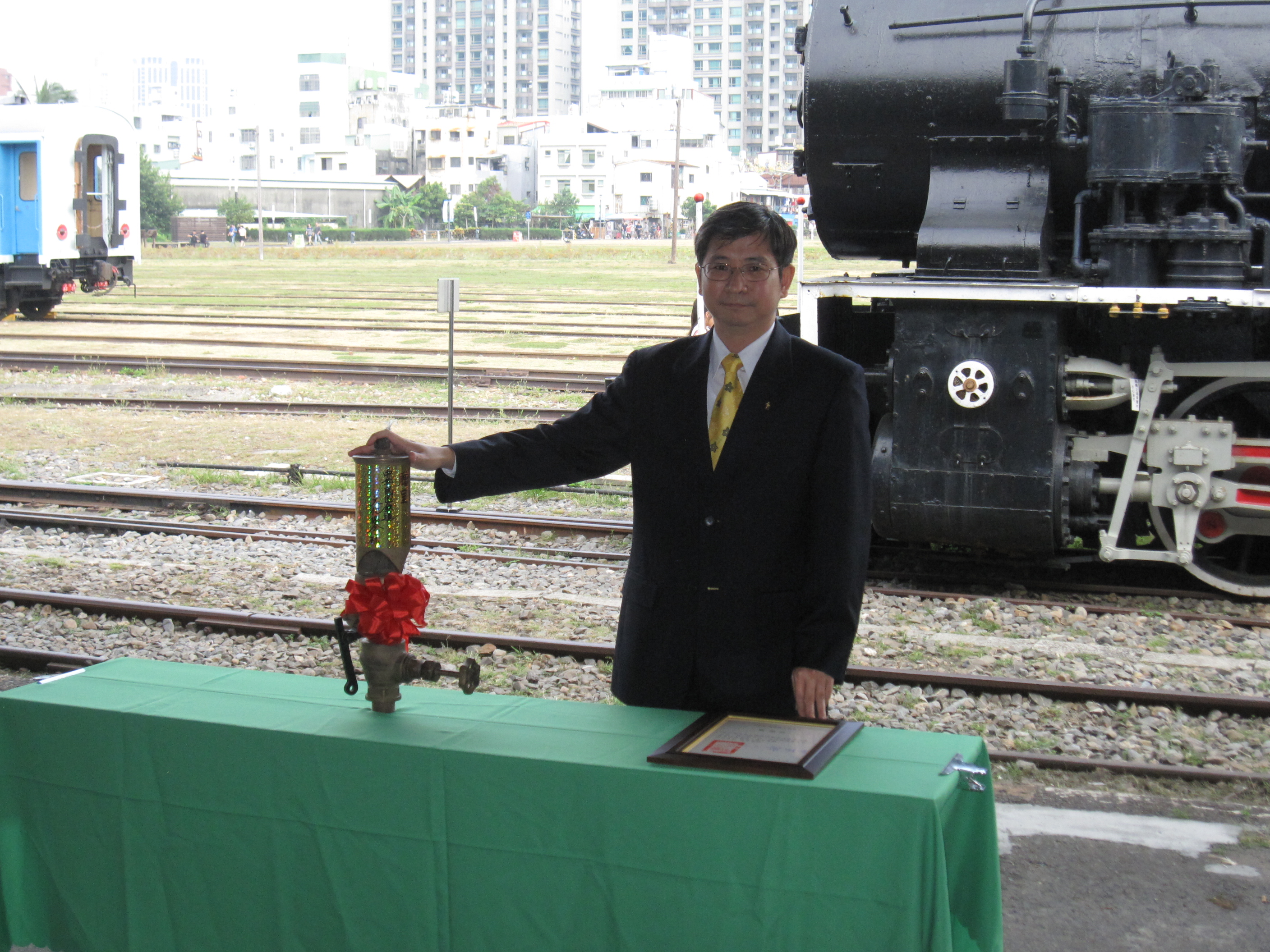 謝明勳，台灣鐵道文化研究者，擔任中華民國鐵道文化協會第六任會長、打狗鐵道故事館館長、交通部鐵路改建工程局運務課課長等職務。